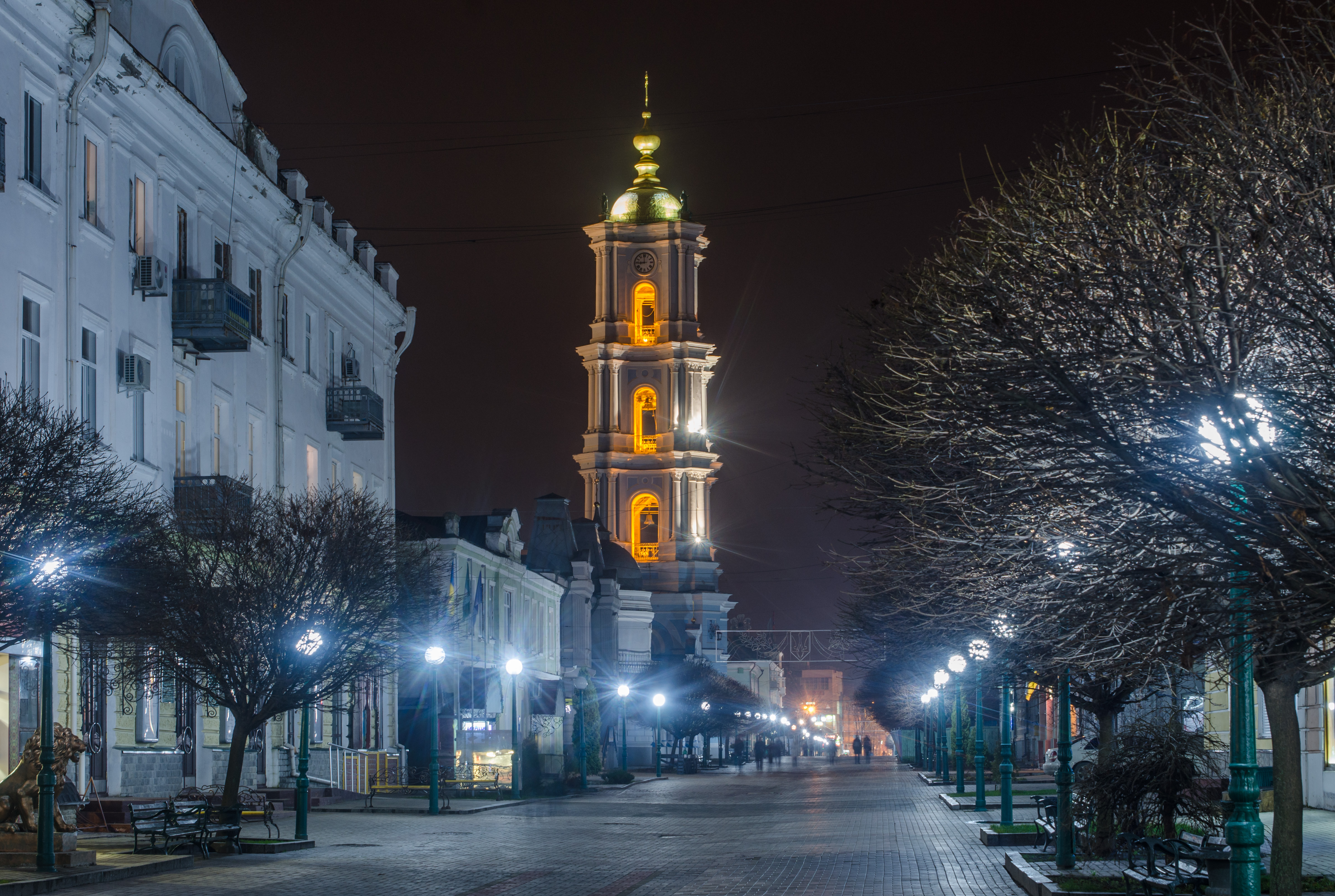 Спасо-Преображенський собор (мур.), Суми, вул. Соборна, 31